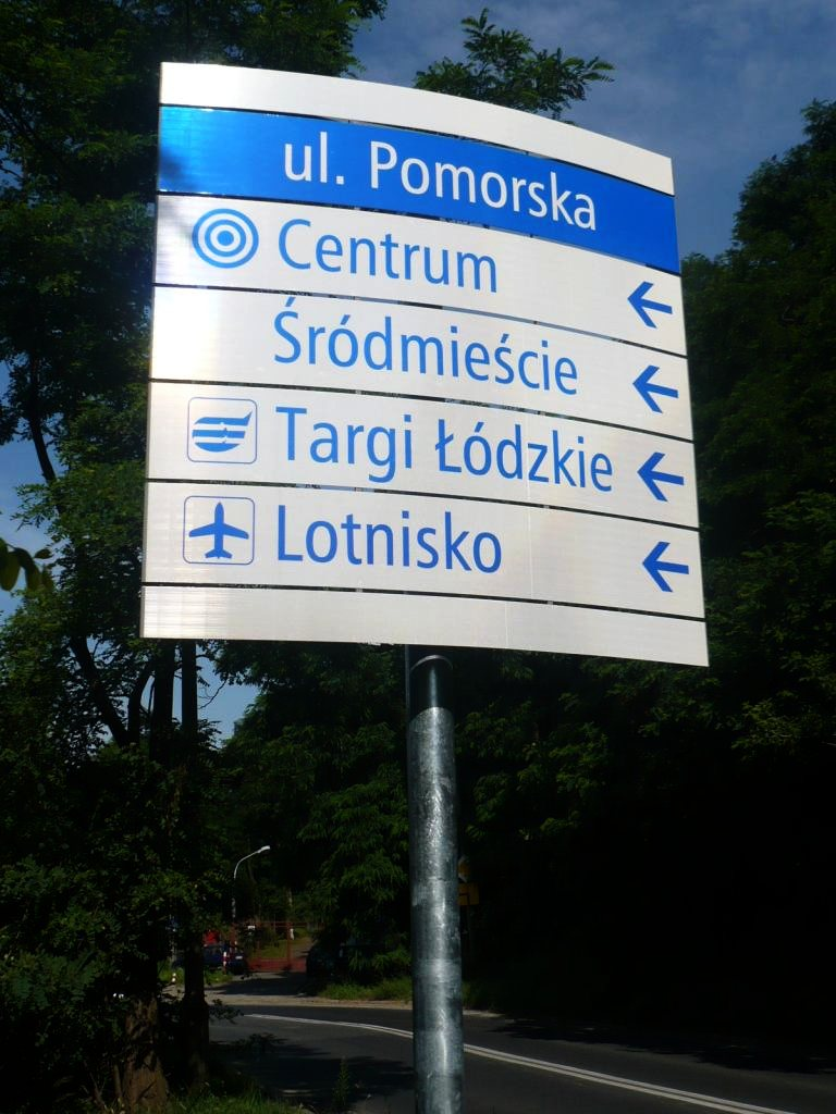 Tablica rozprowadzająca do dzielnic, dworców i ważnych obiektów postawiona latem 2009 r. w Łodzi, przy ul. Pomorskiej w ramach procesu wdrażania Systemu Informacji Miejskiej